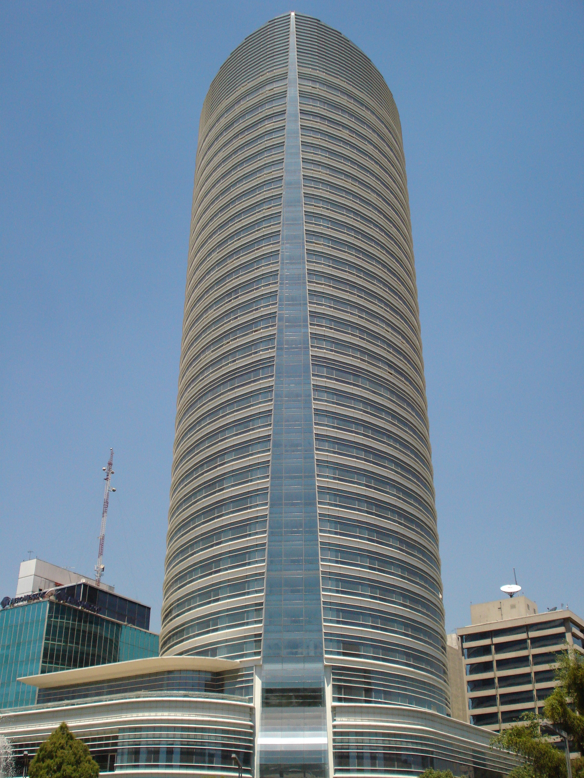 Torre Libertad sede del Hotel St Regis Ciudad de México.